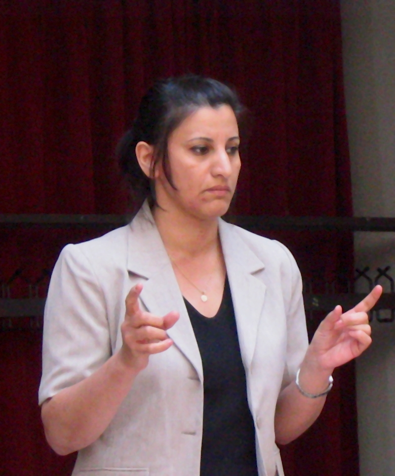 Nadia Mahmood,militante féministe irakienne.